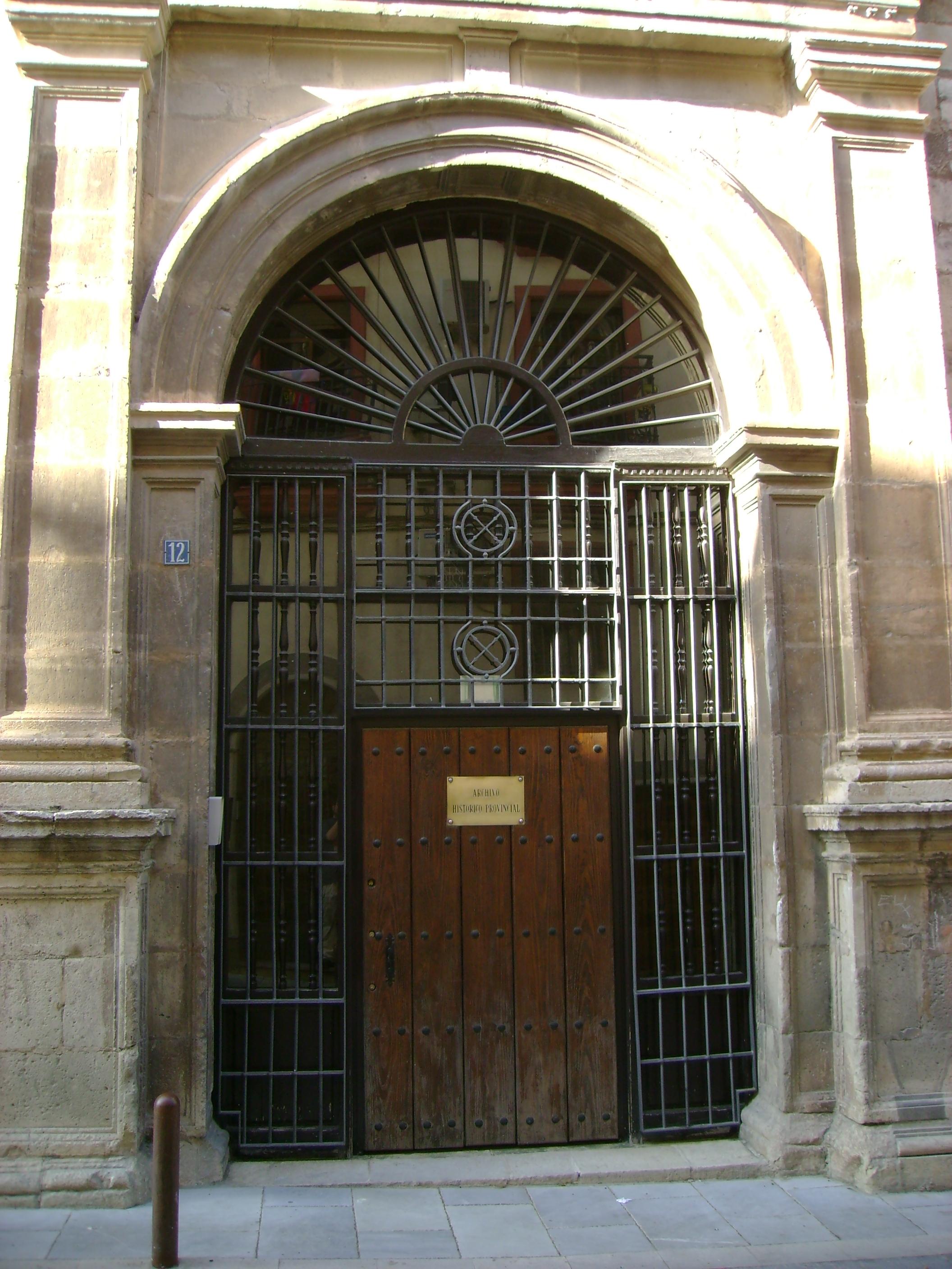 Puerta del Archivo Histórico Provincial de Jaén.